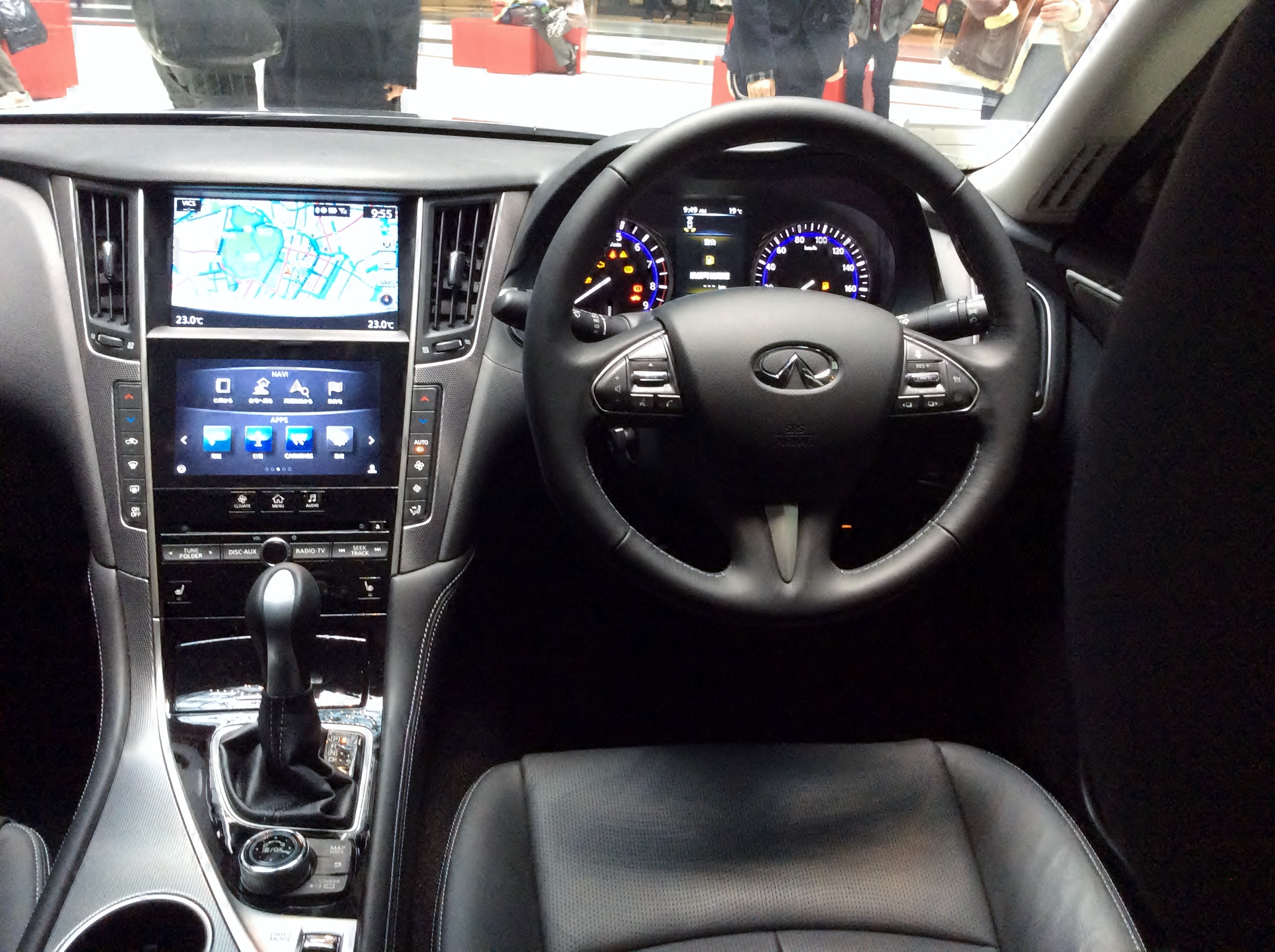 V37型日産・スカイライン350GTハイブリッドタイプPのインテリアを撮影。